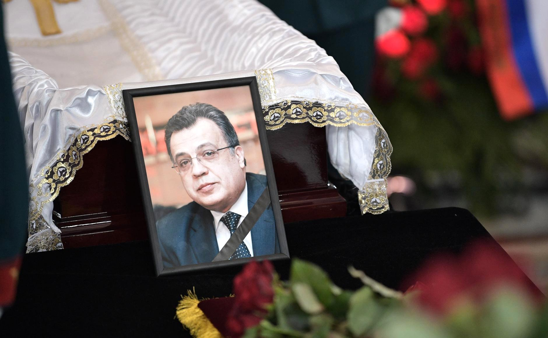 Церемония прощания с Андреем Карловым, послом Российской Федерации в Турции, трагически погибшим 19 декабря в Анкаре в результате террористического акта.